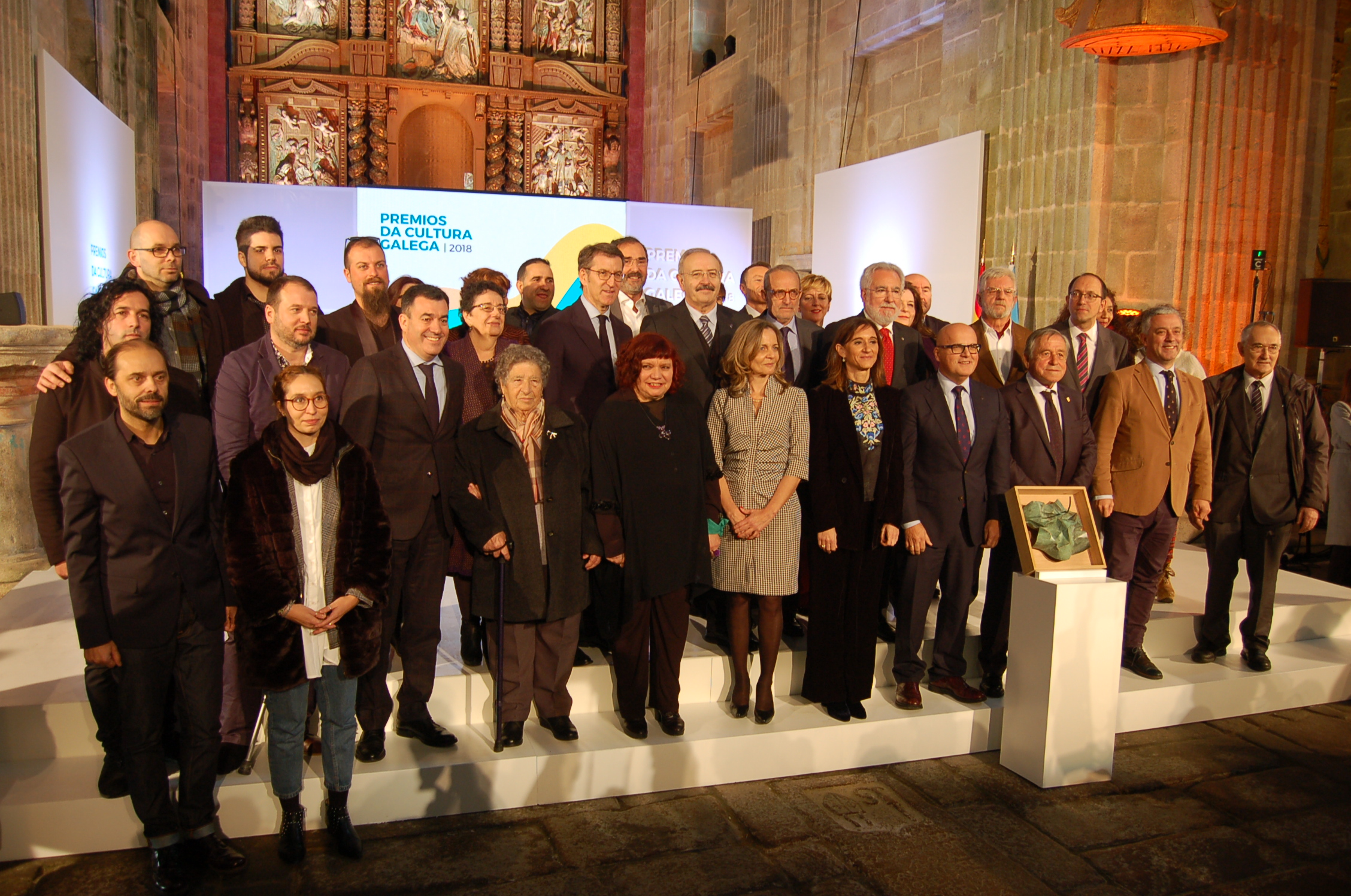 Entrega dos Premios da Cultura Galega 2018, no mosteiro de Santa María de Montederramo